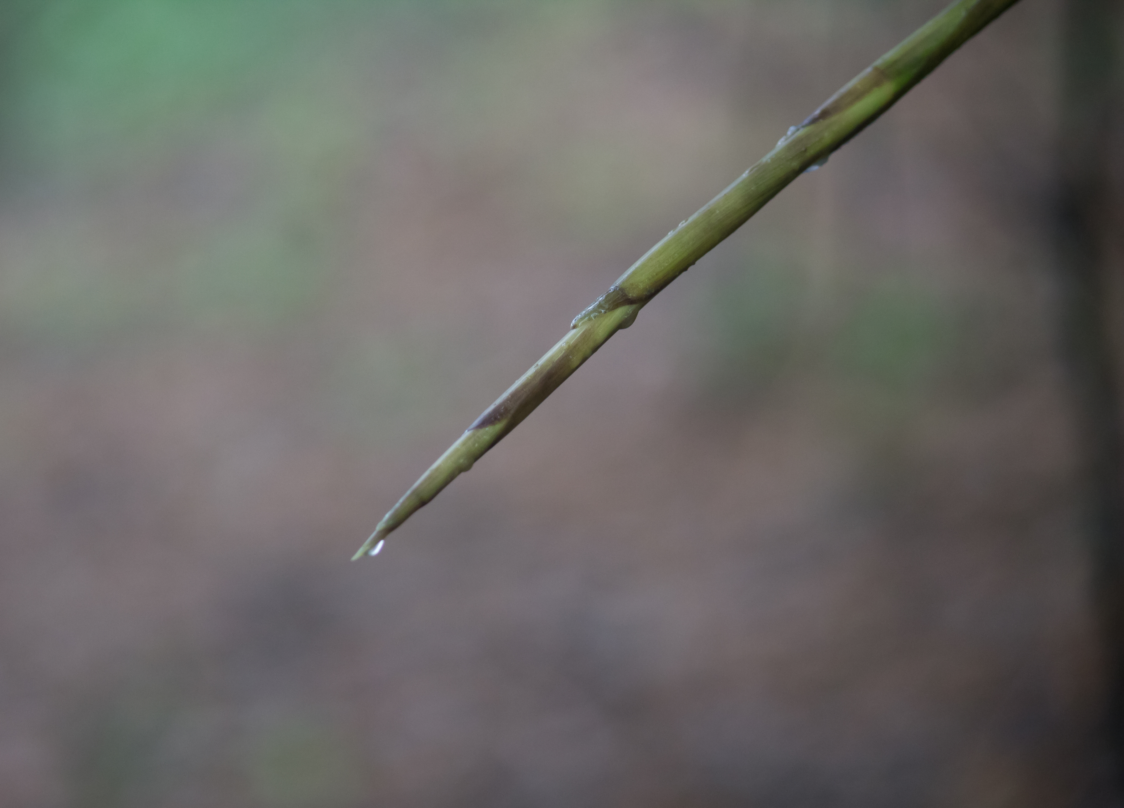 മുളനാമ്പ്. വളരെ വേഗത്തിലാണ് ഇത് വളരുന്നത്. അറ്റം മൂർച്ചയു‌ള്ളതായിരിക്കും.